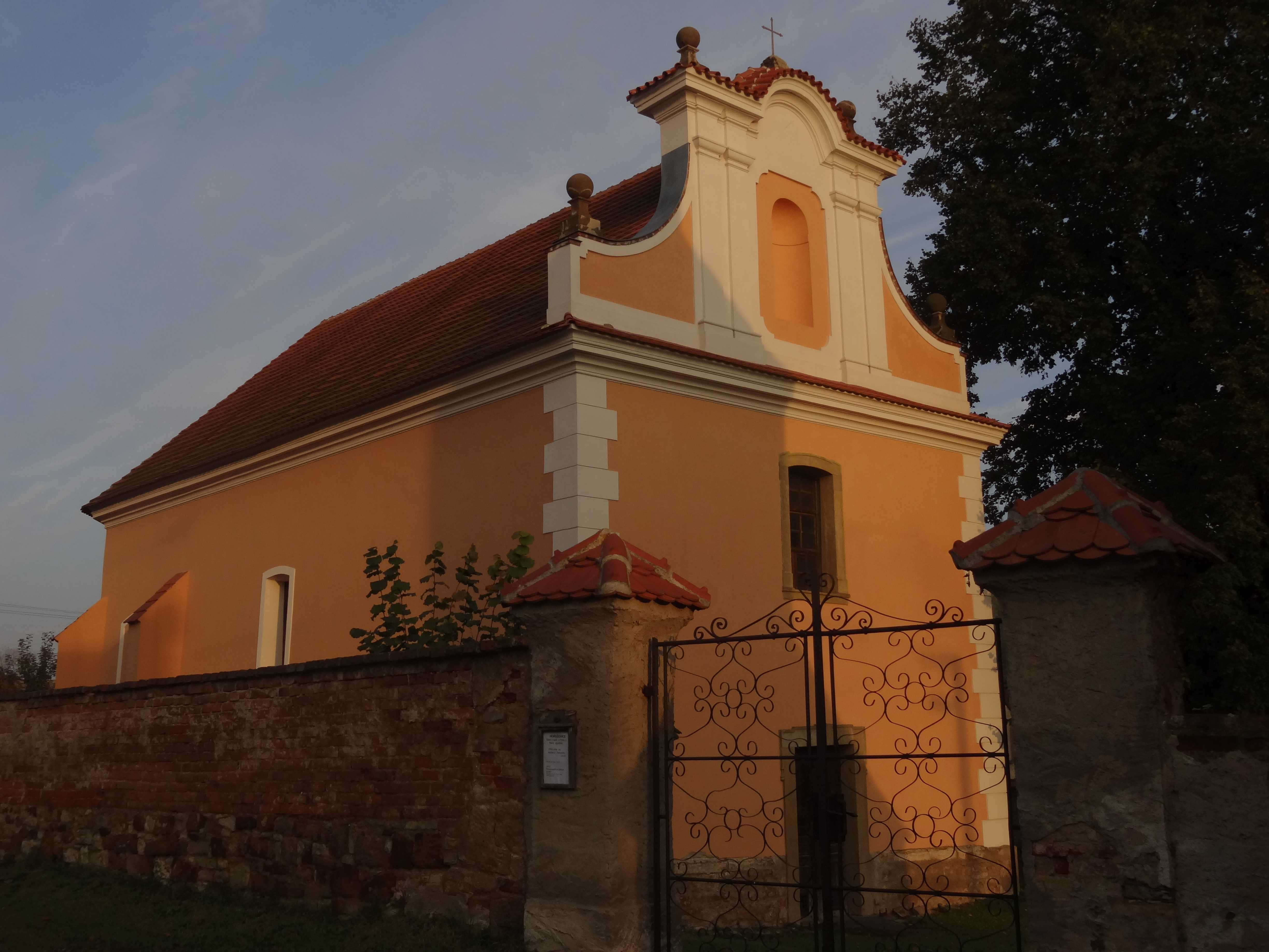 Kostel svatých Petra a Pavla, náves, Hořešovice.